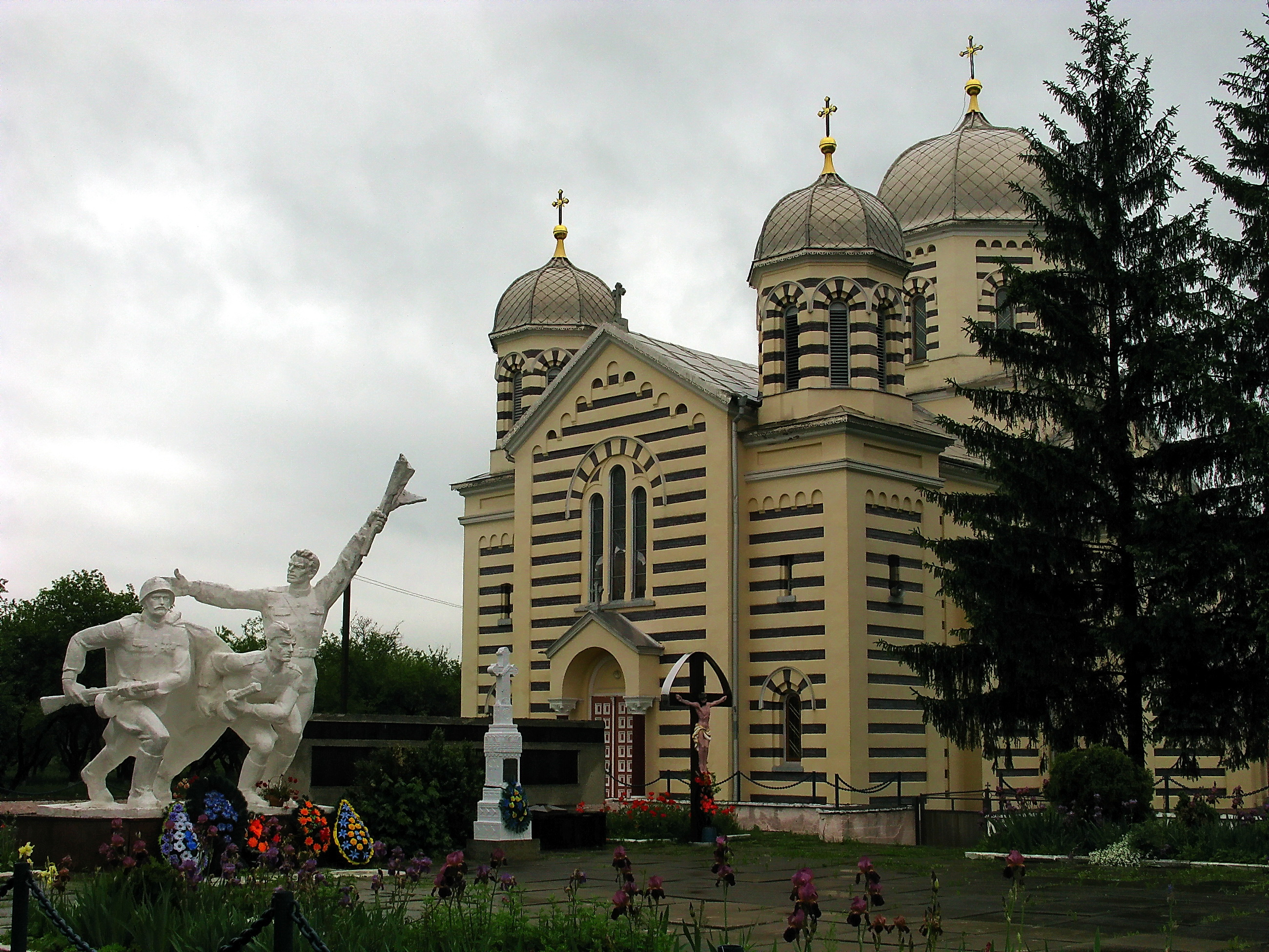 Церква Покрови (мур.), с. Мамаївці